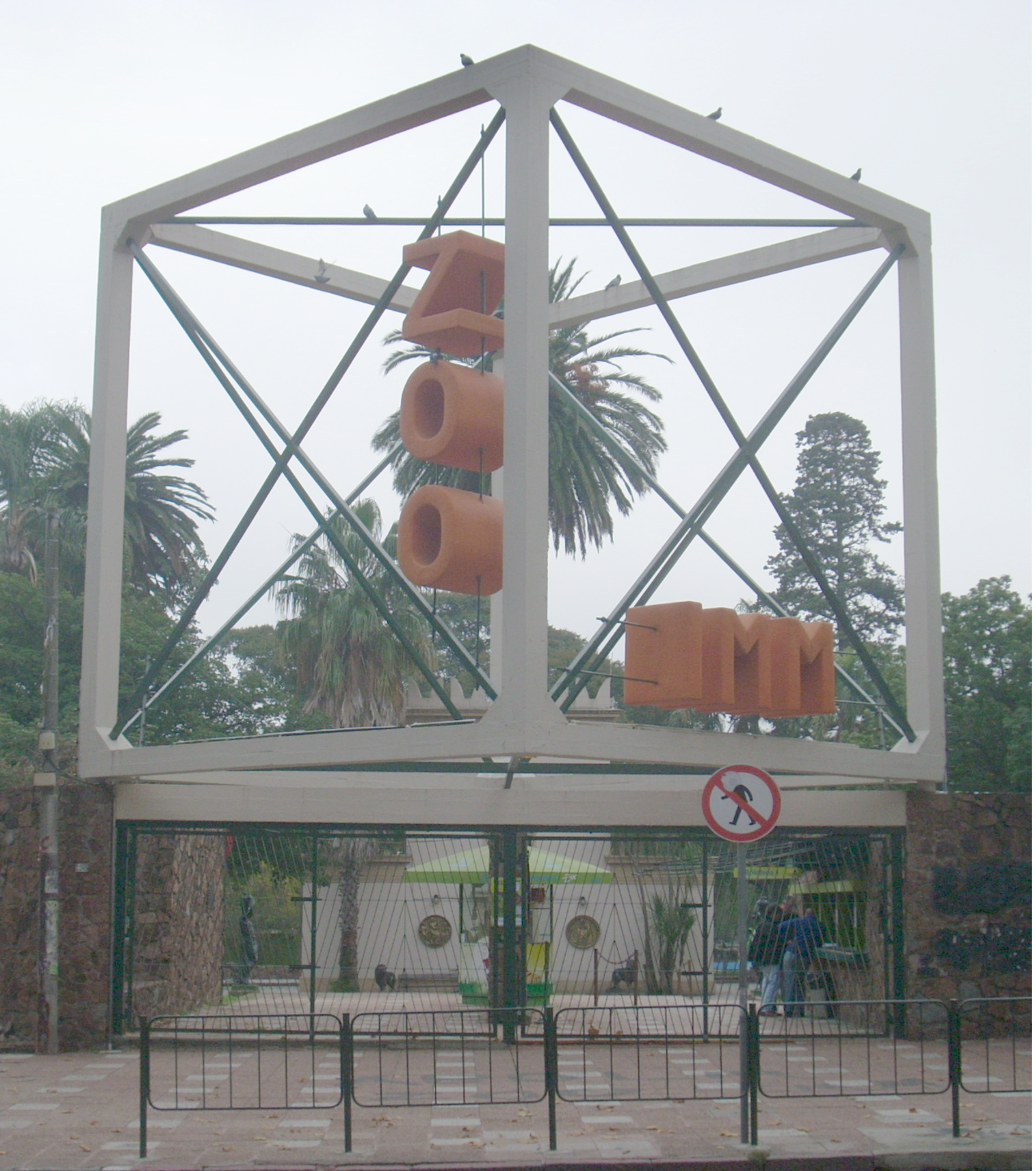 Imagen de la entrada principal del zoológico municipal de Villa Dolores en Montevideo, Uruguay.